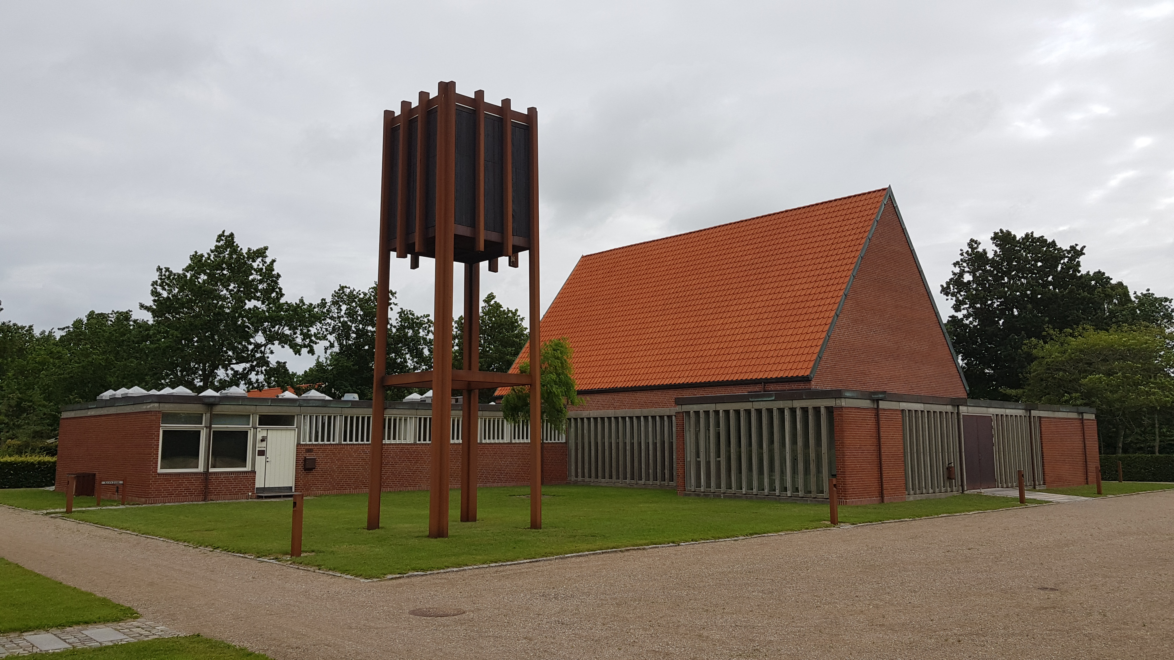 Tønder Kirkegård